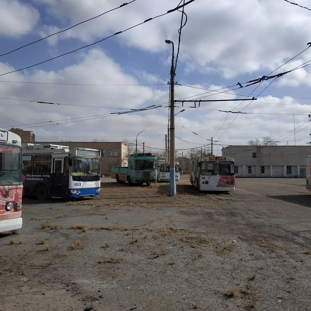 Троллейбусное депо в Астрахани